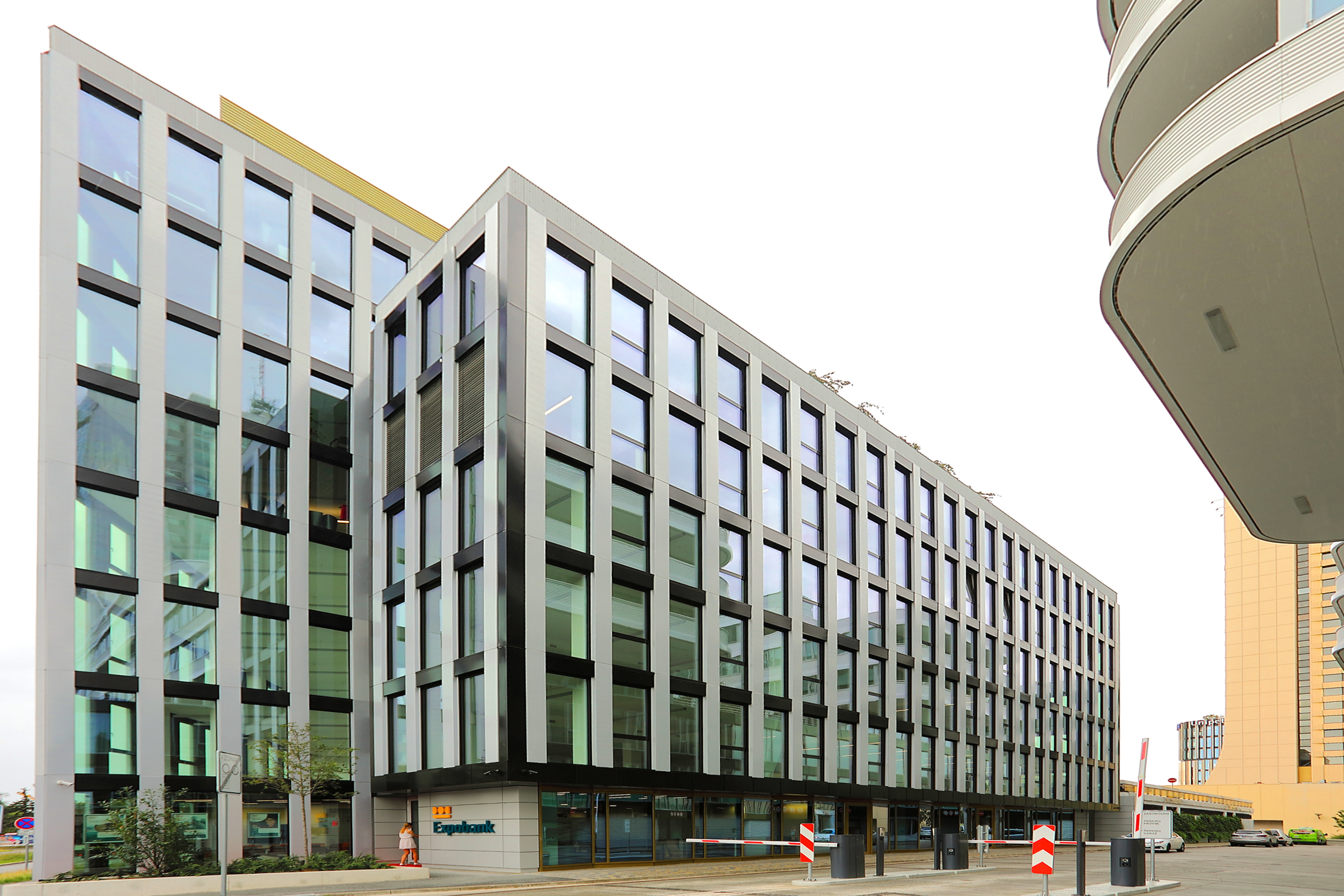 Pobočka Expobank CZ v ulici Na strži 2102/61a, Praha 4